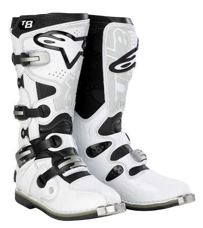 Botas Alpinestars Tech 8